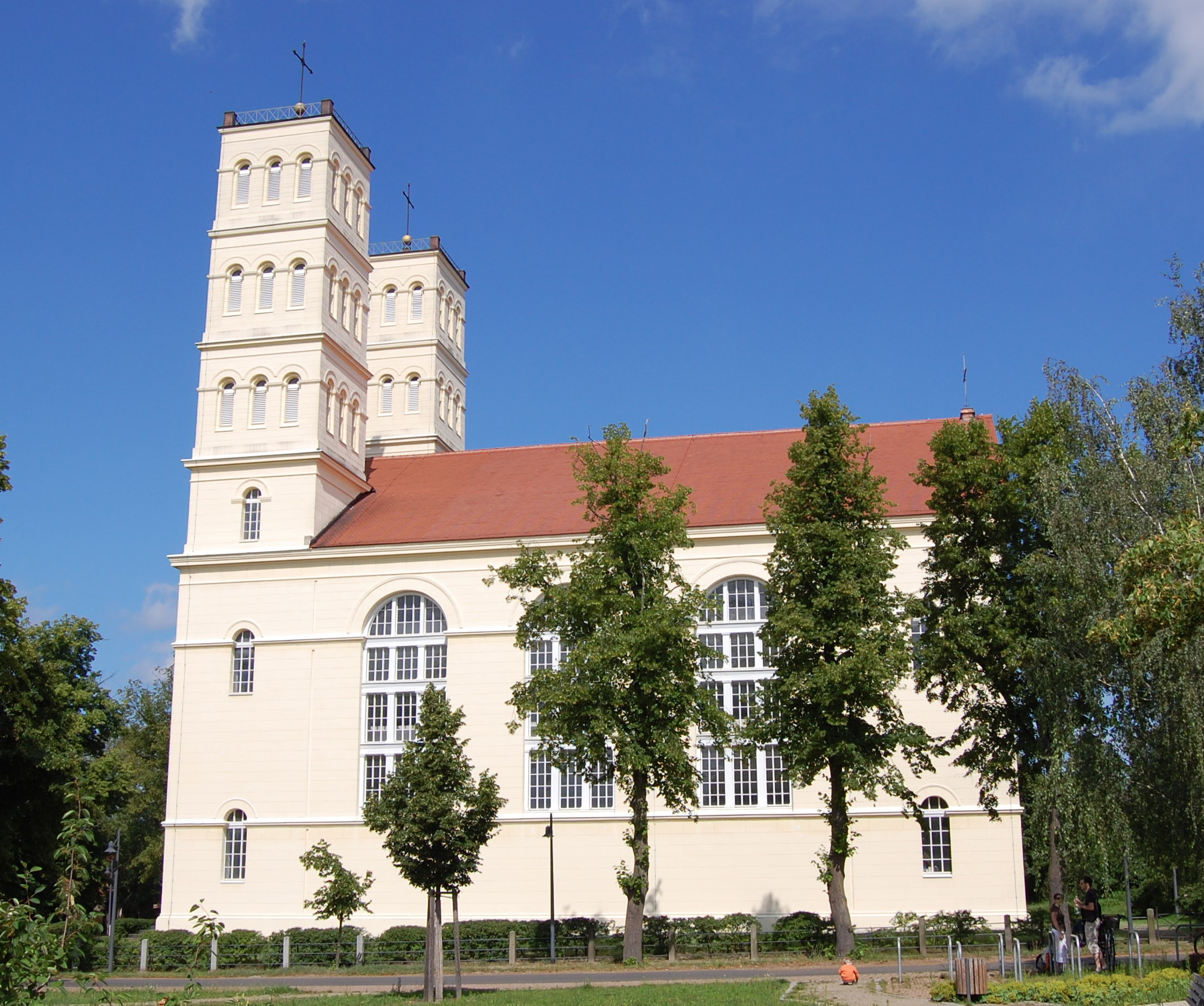 Dorfkirche Straupitz, Südseite